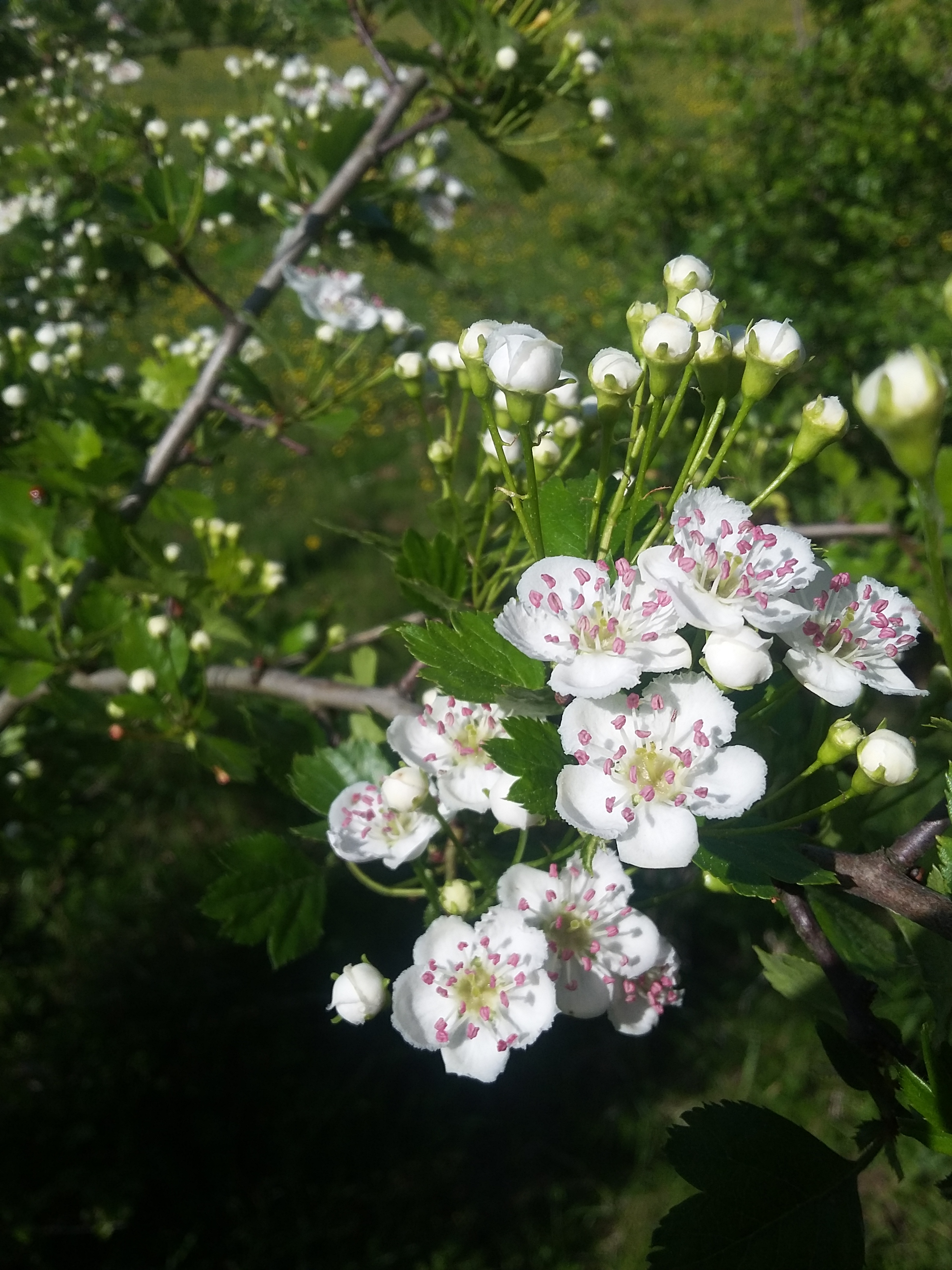 foto větvičky s květem hlohu a poupaty